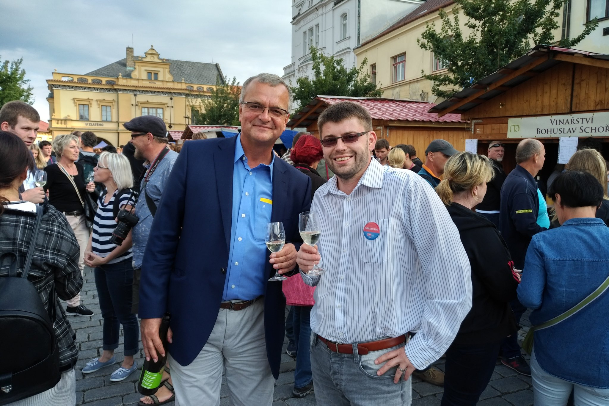 Mělnický košt 2017